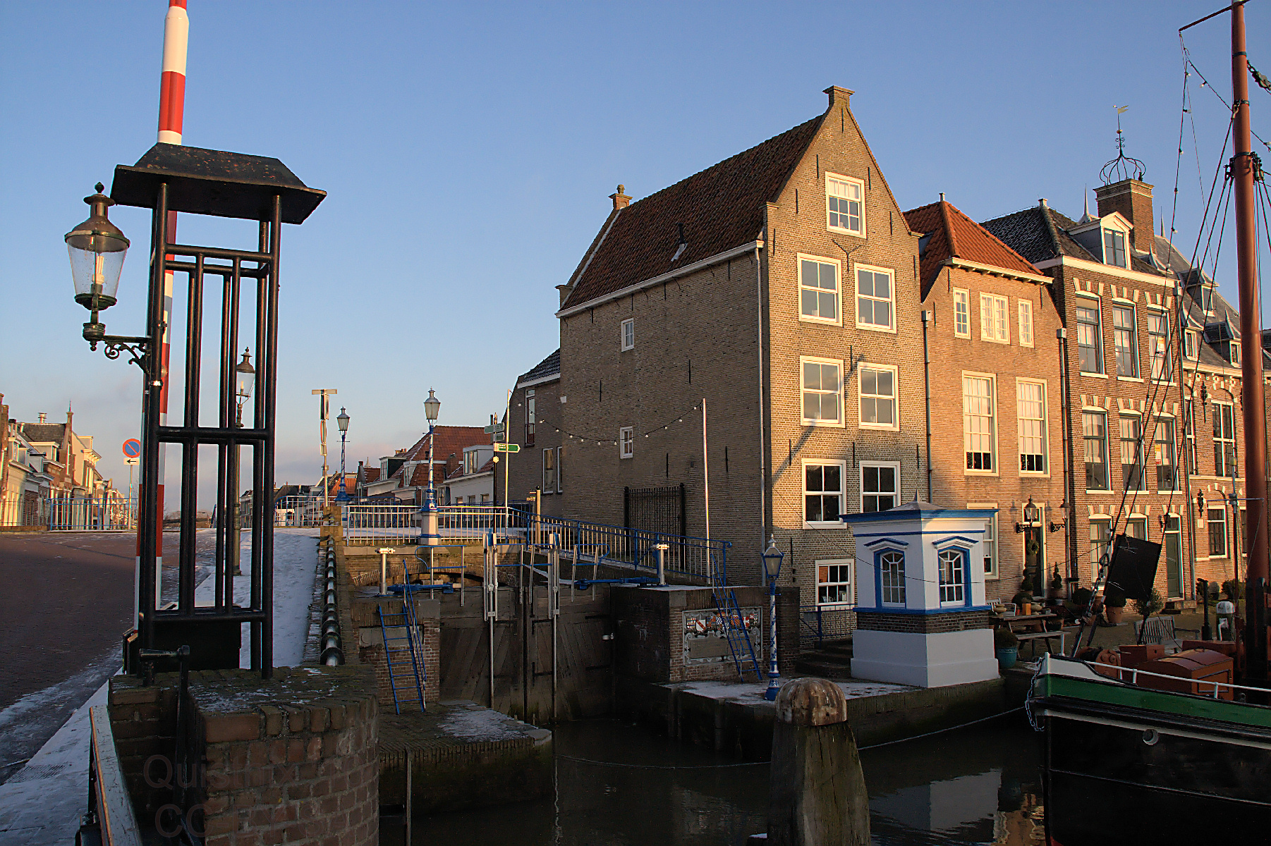 Maassluis: Monstersche Sluis (Rijksmonument nummer 26625), en enkele andere monumentale panden aan de Hoogstraat (het hoekpand heeft het RDMZ-nummer 26607)